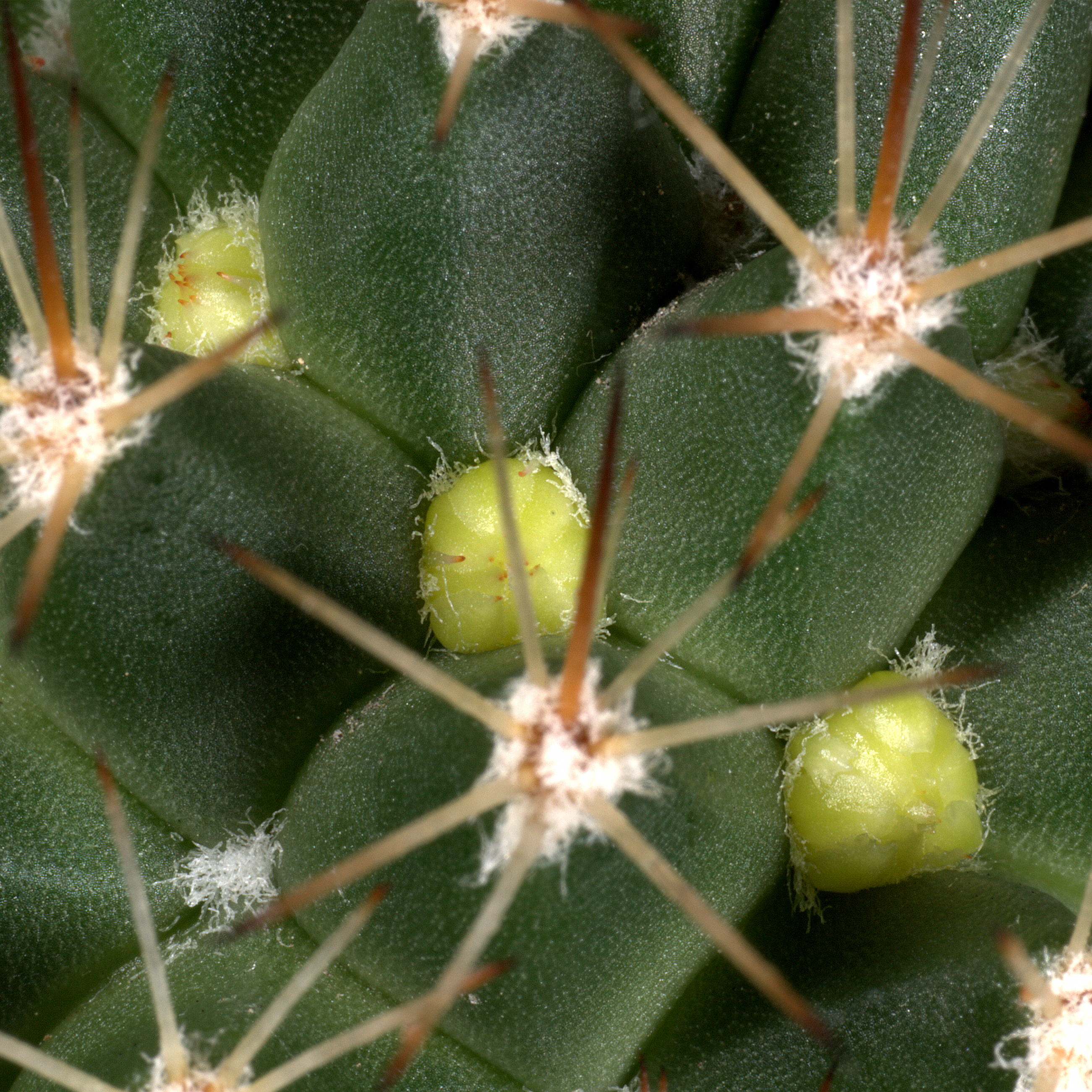 Knopparna på Mammillaria art.